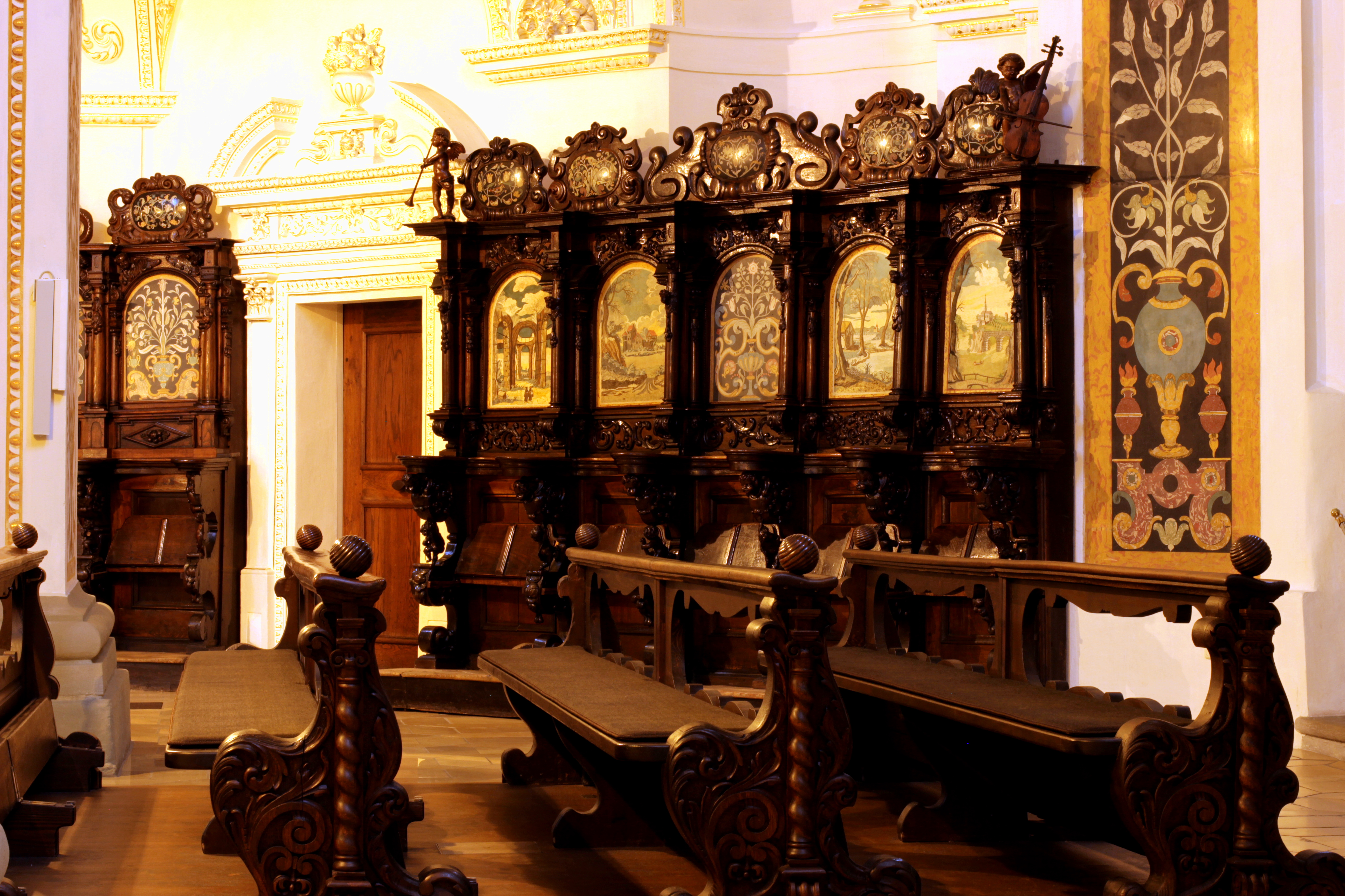 Chorgestühl, Basilika St. Lorenz, Kempten